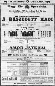 A fából faragott királyfi ősbemutatójának plakátja.